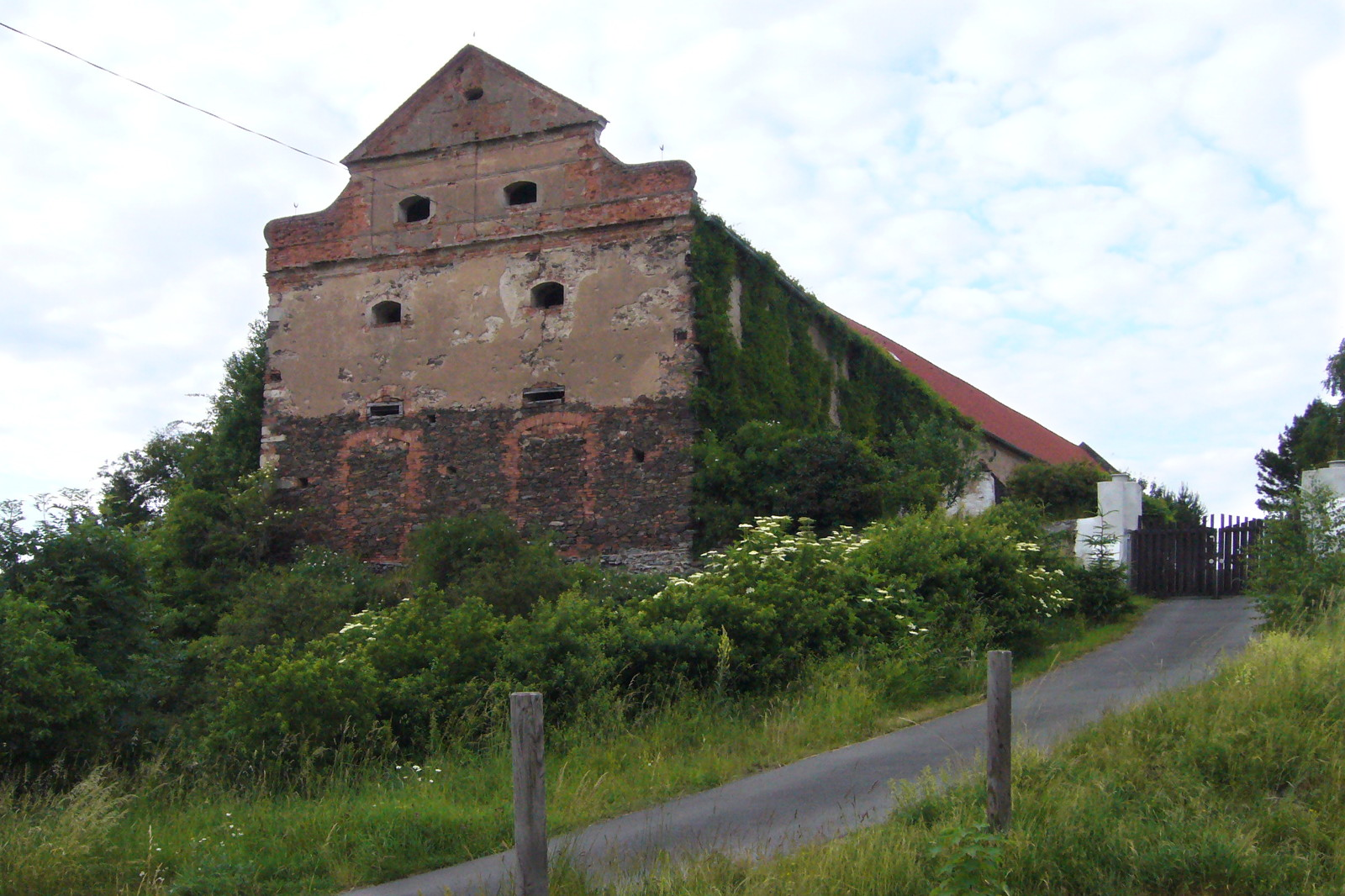 Hrad Třebel, Jihozápadní okraj vesnice, Třebel.